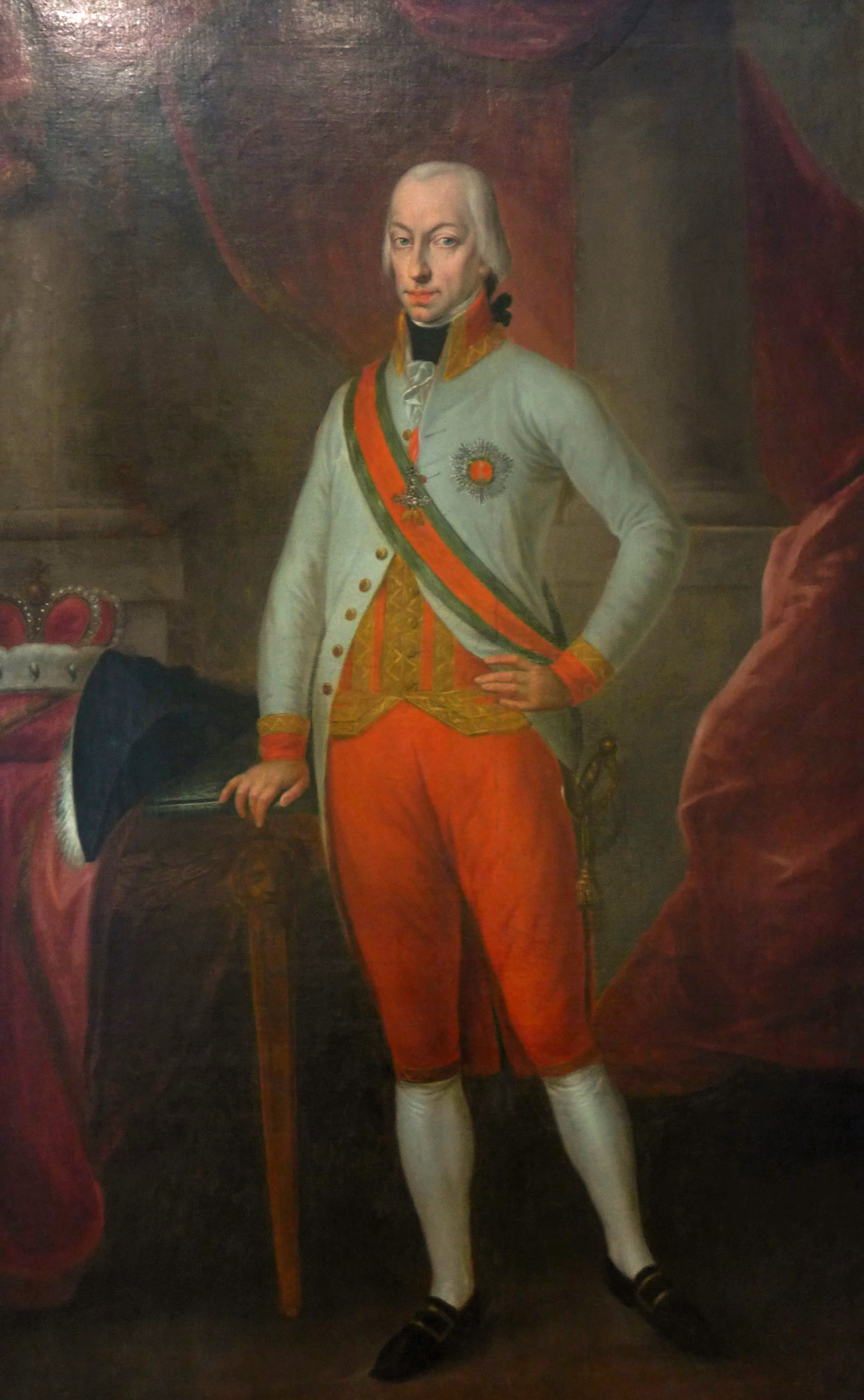 Großherzog Ferdinand III. von Toskana, Das Staatsporträt zeigt Ferdinand einerseits als österreichischen Erzherzog in weiß-roter österreichischer Feldmarschalls-Uniform, andererseits als Großherzog von Würzburg. Neben dem zur Uniform gehörenden Zweispitz sind auf dem Tisch auch Herzogshut sowie Szepter des Großherzogtums Würzburg drapiert. Ferdinand trägt das Kleinod des Ordens vom Goldenen Vlies sowie Großkreuz und Schärpe des königlich-ungarischen St.-Stephansordens (Unbekannter Künstler, um 1810, Öl auf Leinwand, Bayerische Schlösserverwaltung, Inventarnummer Würzburger Residenz G0010).